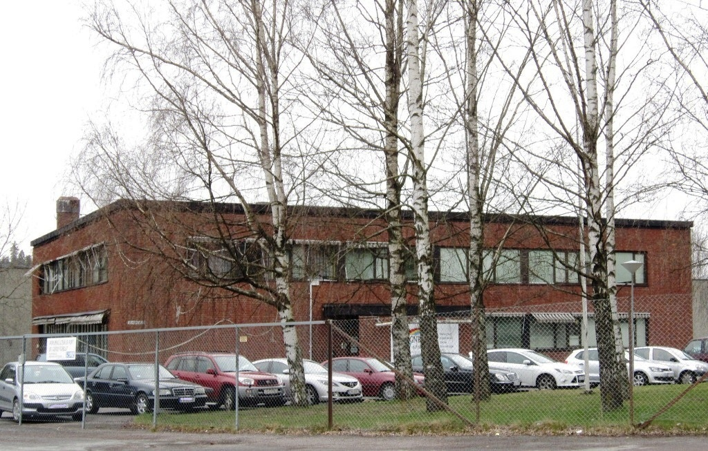 Regnbuen kristne fellesskap, Lørenskog